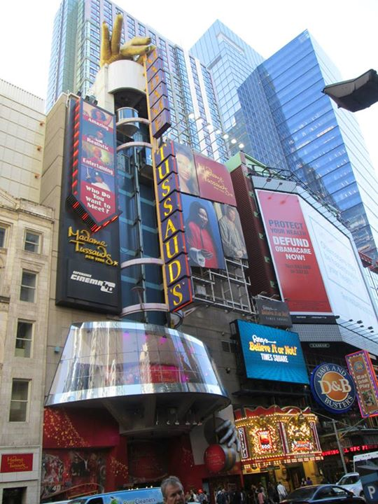 Madam tussads new york